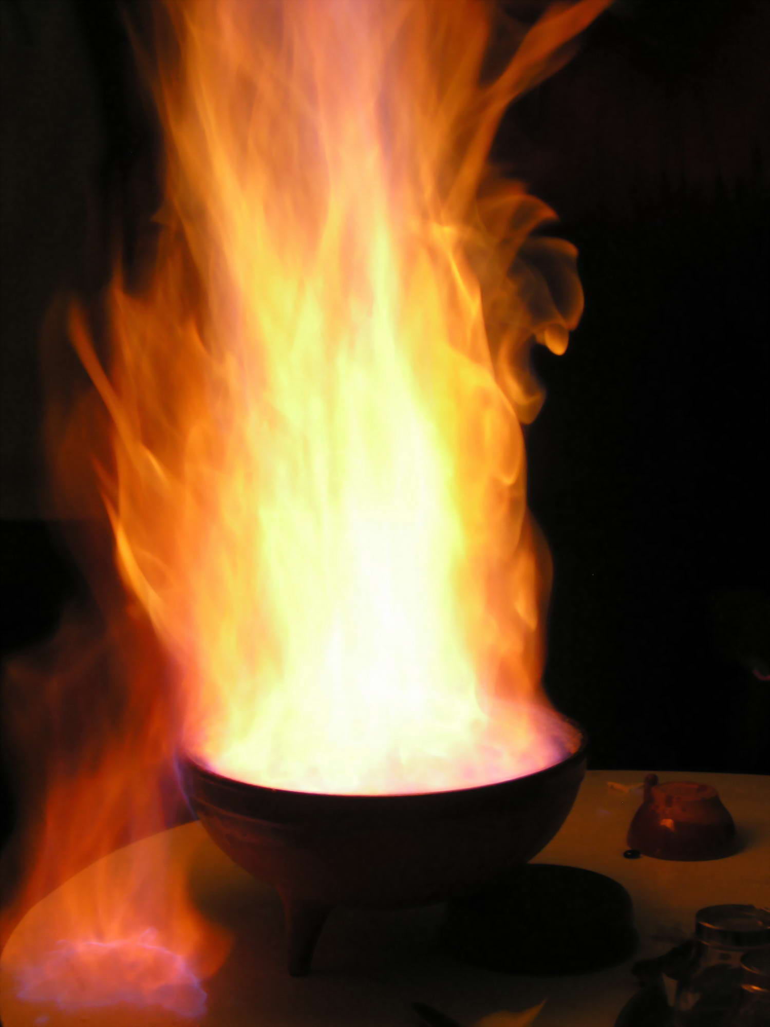 Queimada. Tamborileiro. Galicia